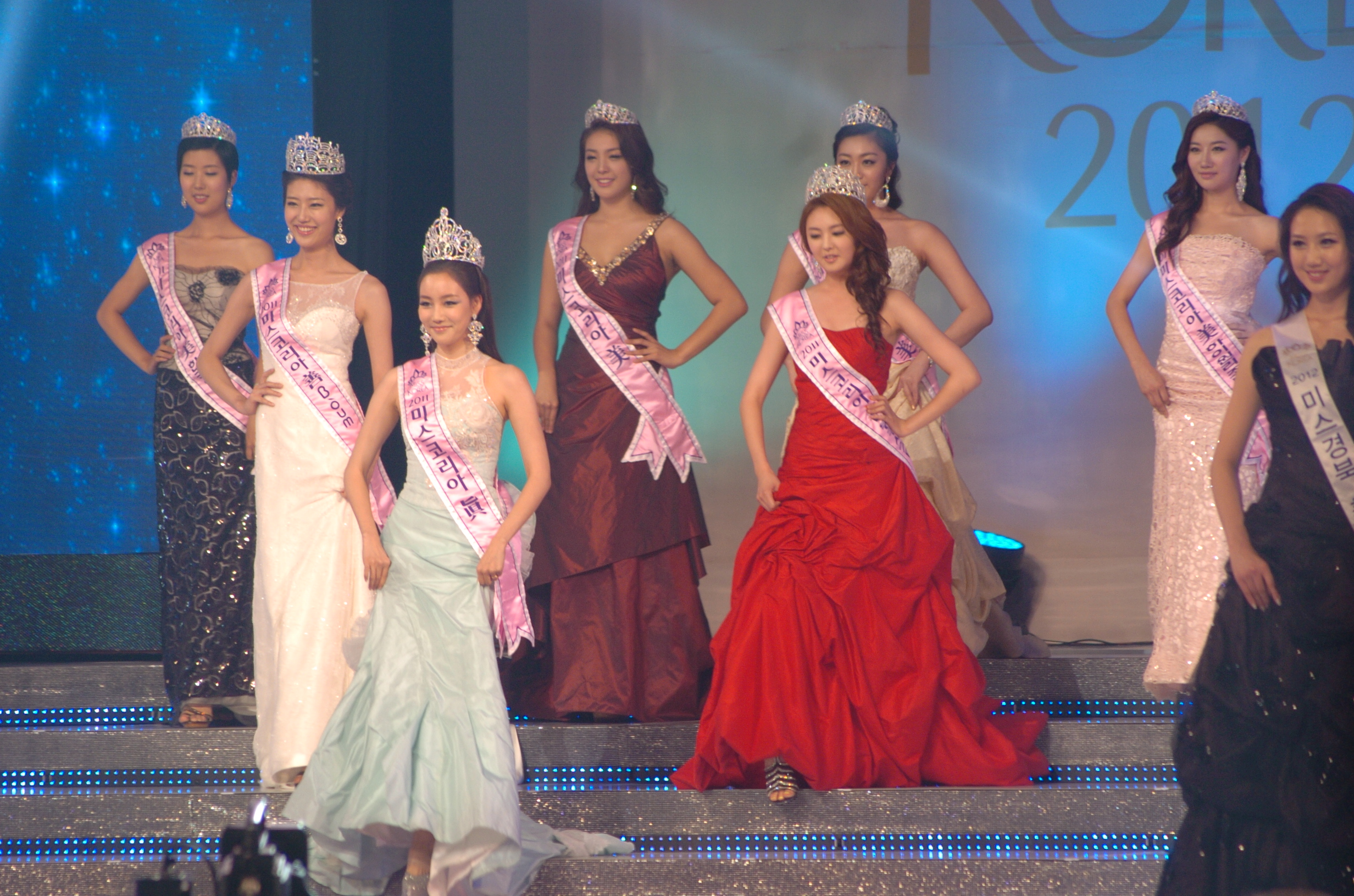 2011 미스코리아 당선자들